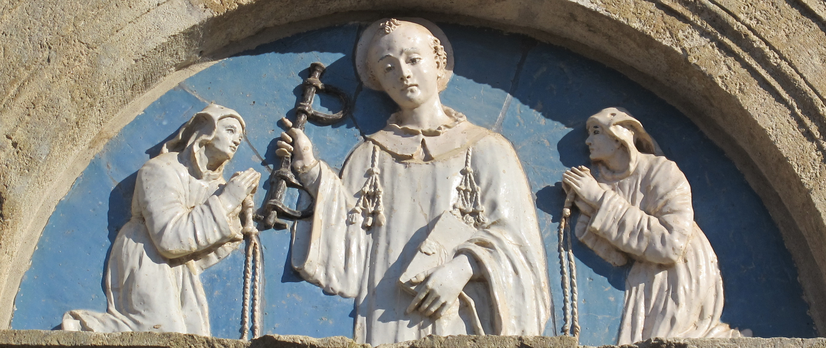 Santi Giorgio e Cristina (Bolsena)